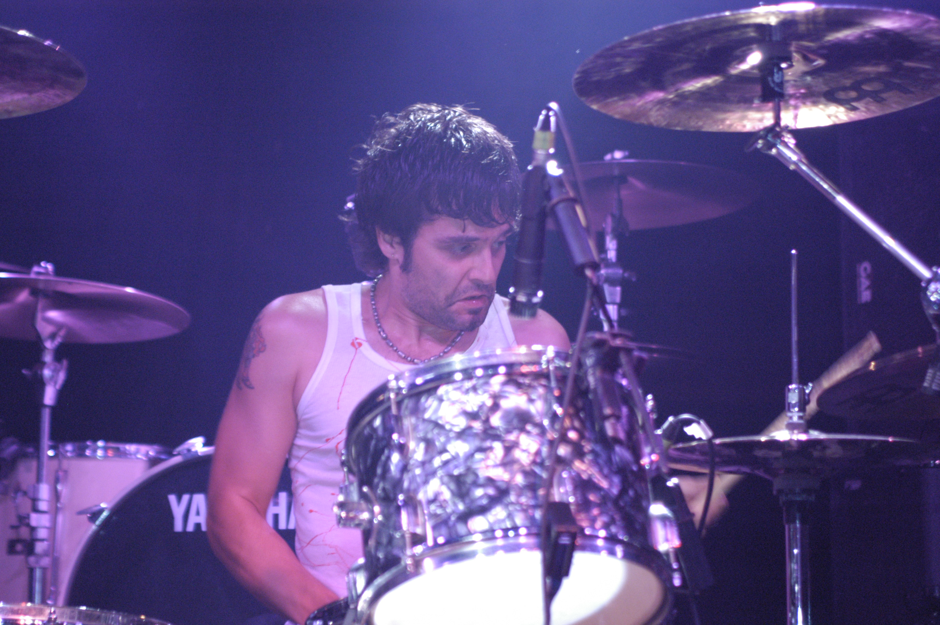 Andy Schumacher live